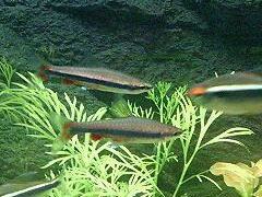 ベックフォルディペンシル（Nannostomus beckfordi） 下個体は婚姻色を呈している。